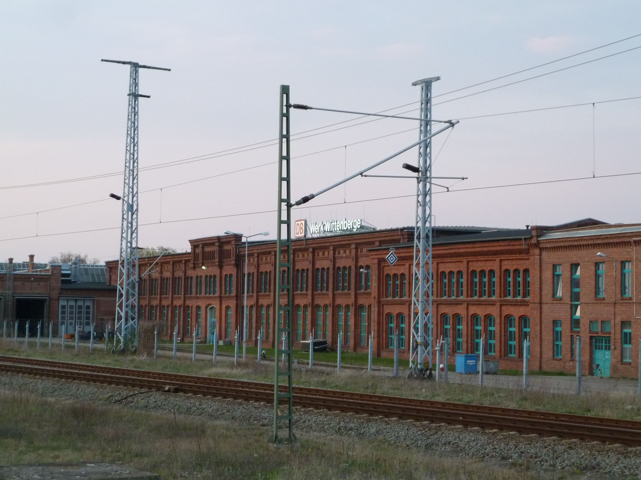 Halle des Ausbesserungswerks Wittenberge.